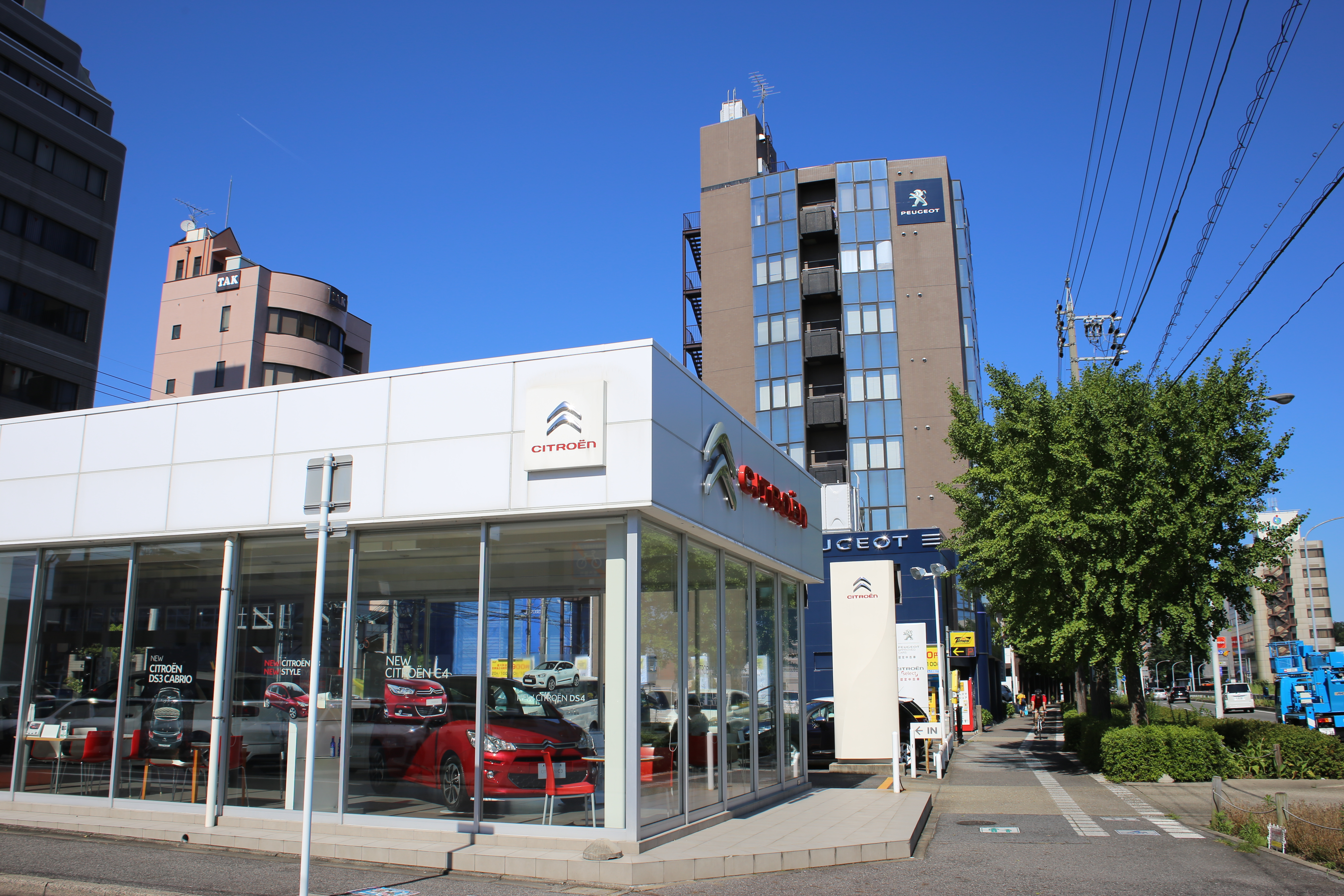 名古屋市名東区本郷のホワイトハウス本社を南側公道西側より撮影